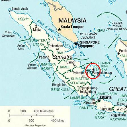 Uit Commons; ovaal toegevoegd